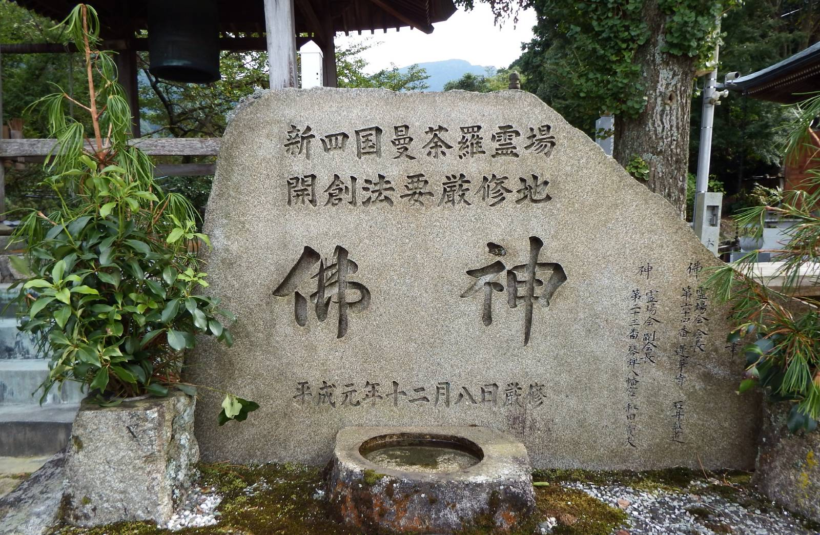 新四国曼荼羅霊場の碑